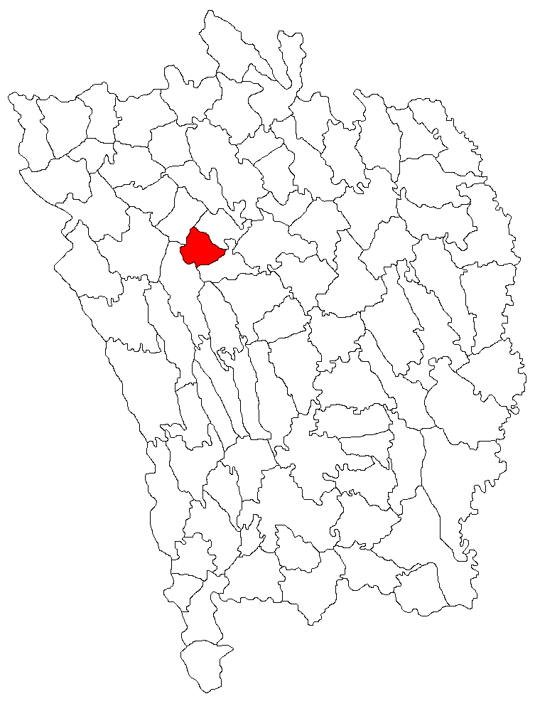 Categorie:Hărţi ale judeţului Vaslui